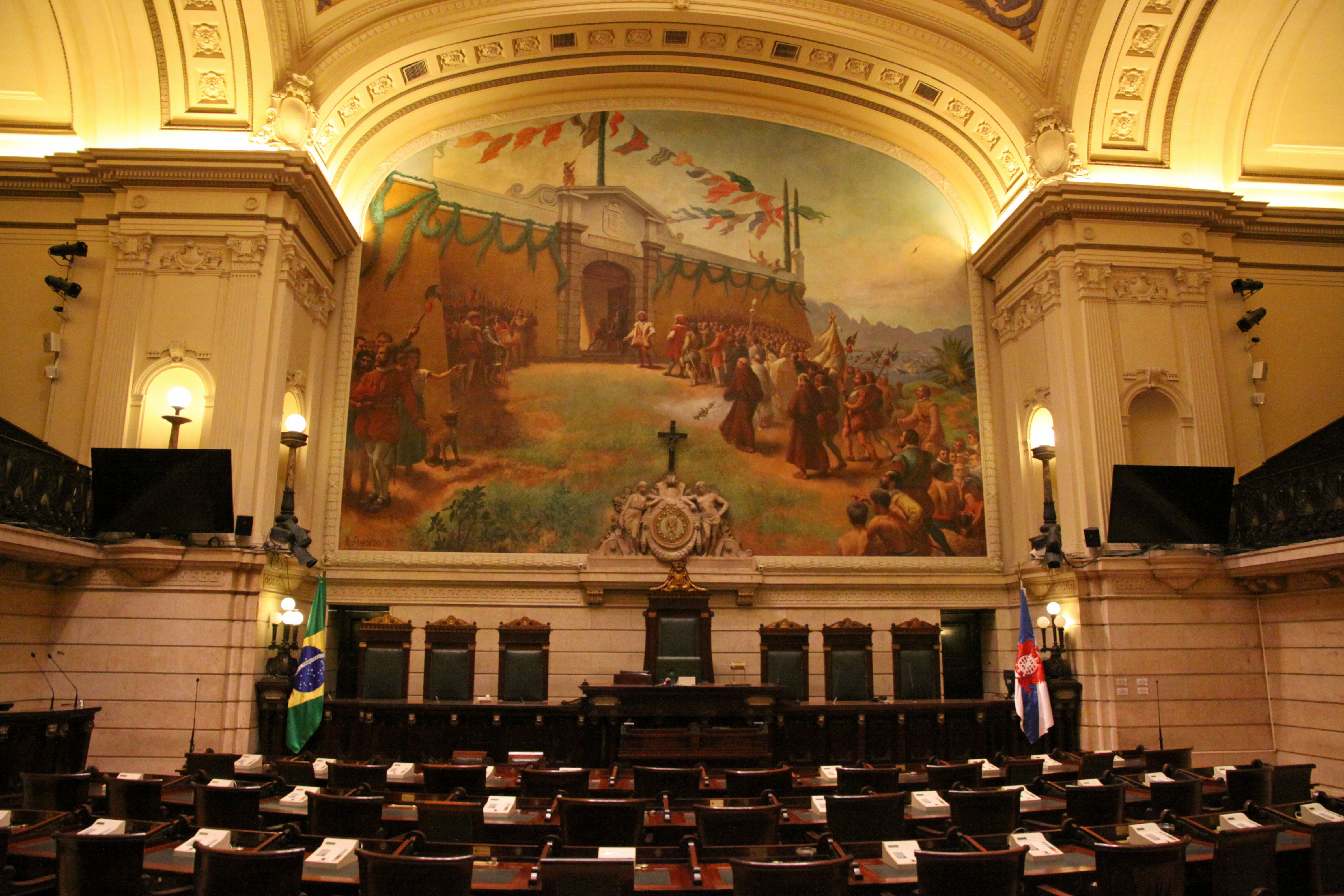 No Plenário, na parede ao fundo da Mesa, há um painel de Rodolfo Amoedo, assinado e datado 1923.